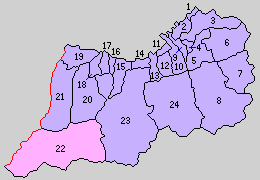 愛媛県宇摩郡の町村制時点の町村。